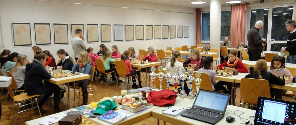 Die Freiburger Bezirks-Schach-Einzelmeisterschaften der weiblichen Jugend U8 bis U20 am 6. Dezember 2014 im Zähringer Keller.